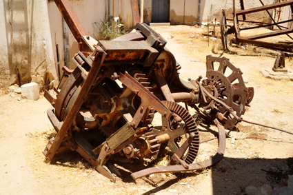 Reste des 1897 errichteten Windmotors der Wagenbaufirma Hälbich in Otjimbingwe (Namibia), nationales Denkmal - zerstört 2008, Zustand 2012. Im Hintergrund Reste des ehemals ca. 20 Meter hohen Stahlgerüstes.